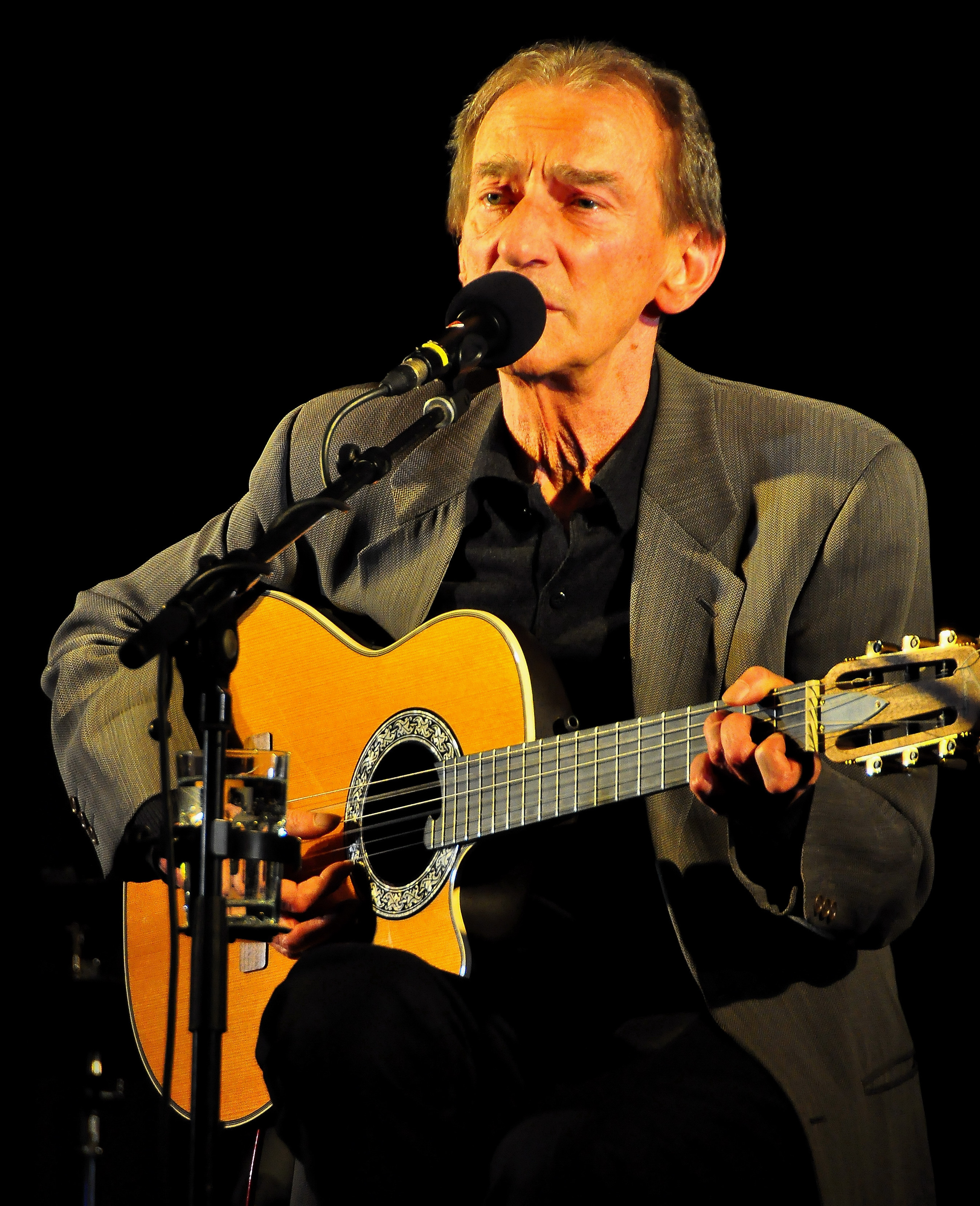 Ein wunderbares Konzert